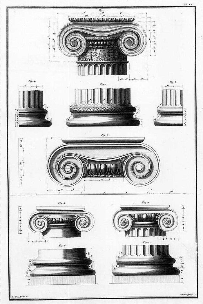 six Ionic orders